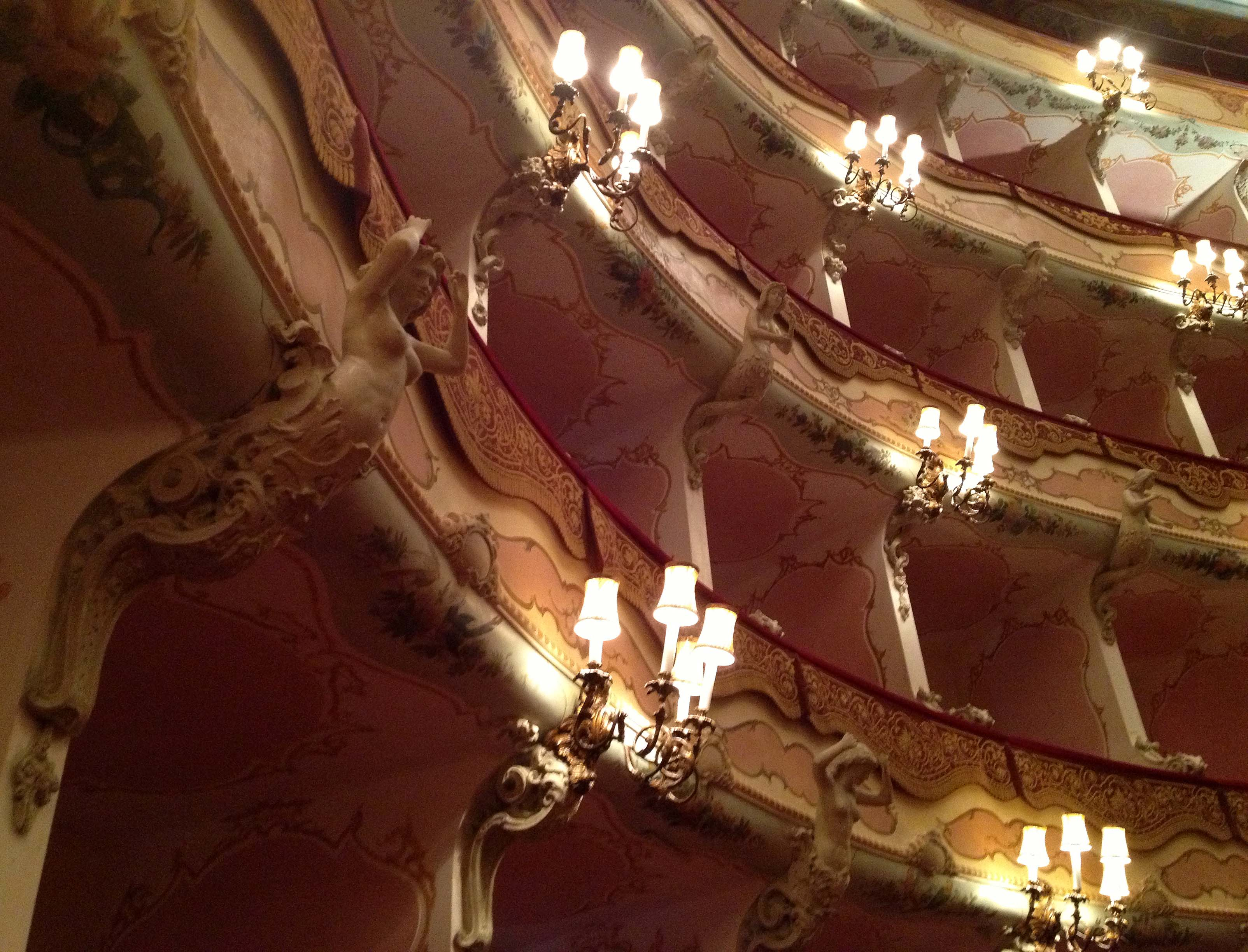 Teatro Comunale "Mario Del Monaco" di Treviso - Palchi della Sala.